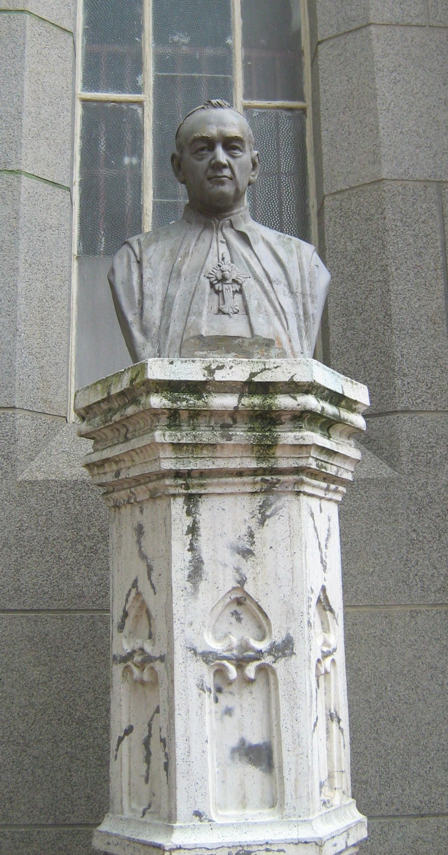 Busto del Obispo Miguel Ángel Builes, en la entrada del templo parroquial del municipio de Donmatias. Antioquia. Colombia.